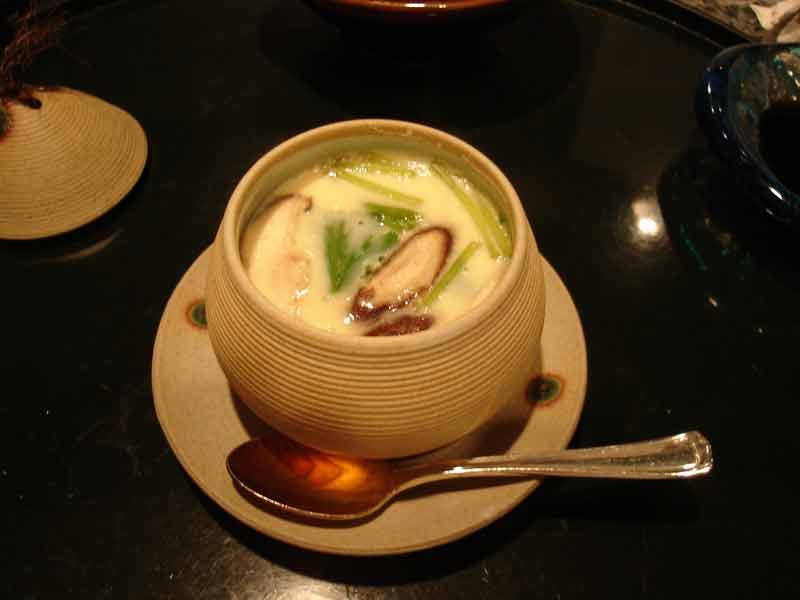 Chawan Mushi @ Kacho (2006-05-15)